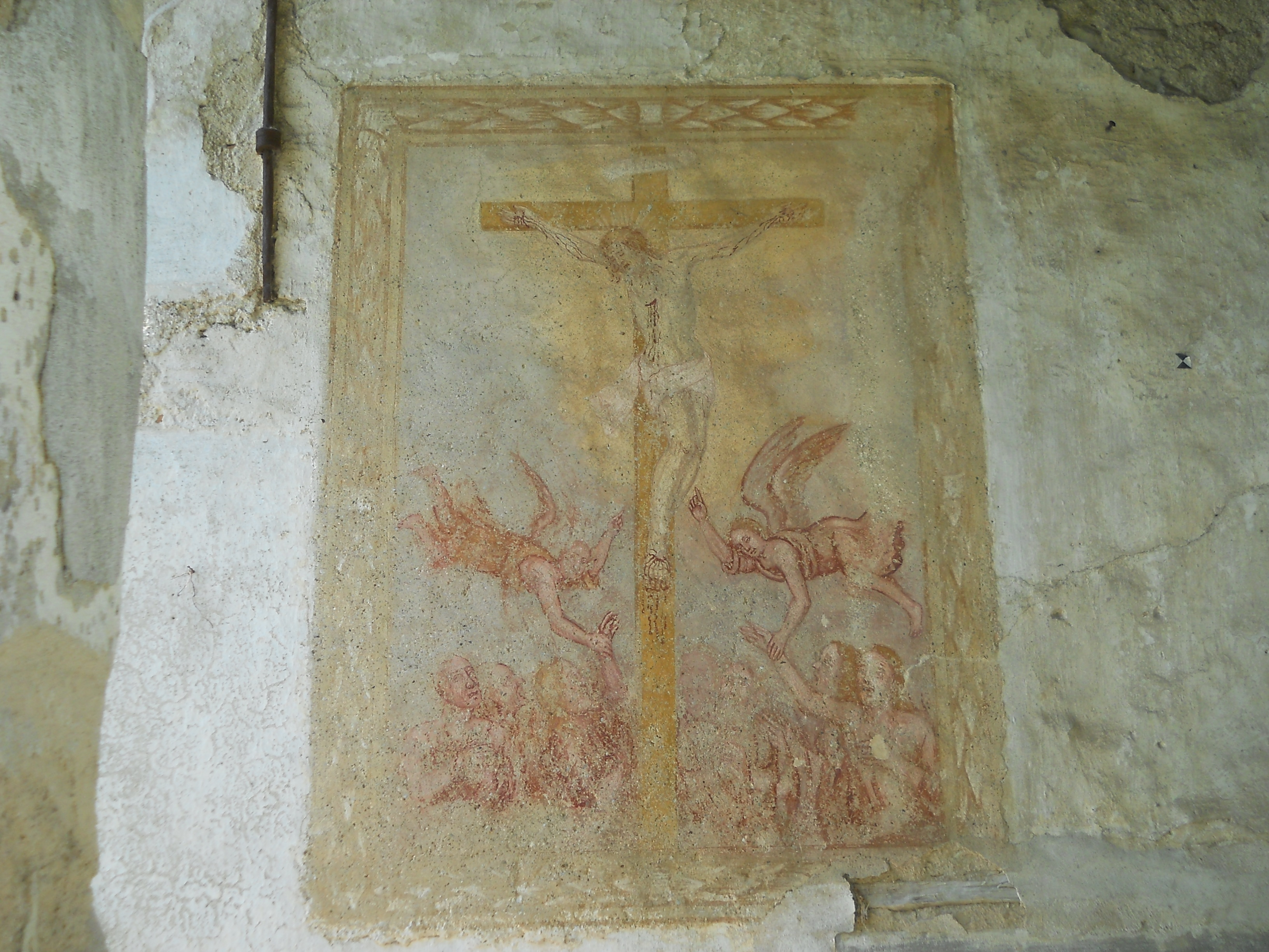 Affresco sulla parete esterna della chiesa romanica del complesso di Sant'Alessandro in Canzanica ad Adrara San Martino